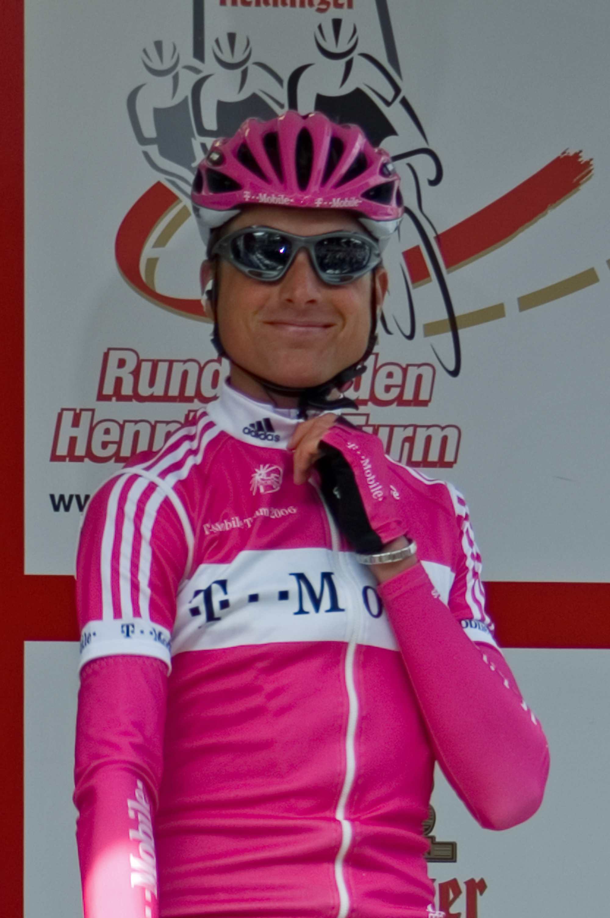 Germany Frankfurt am Main Rund um den Henninger-Turm T-Mobile Team Patrick Sinkewitz